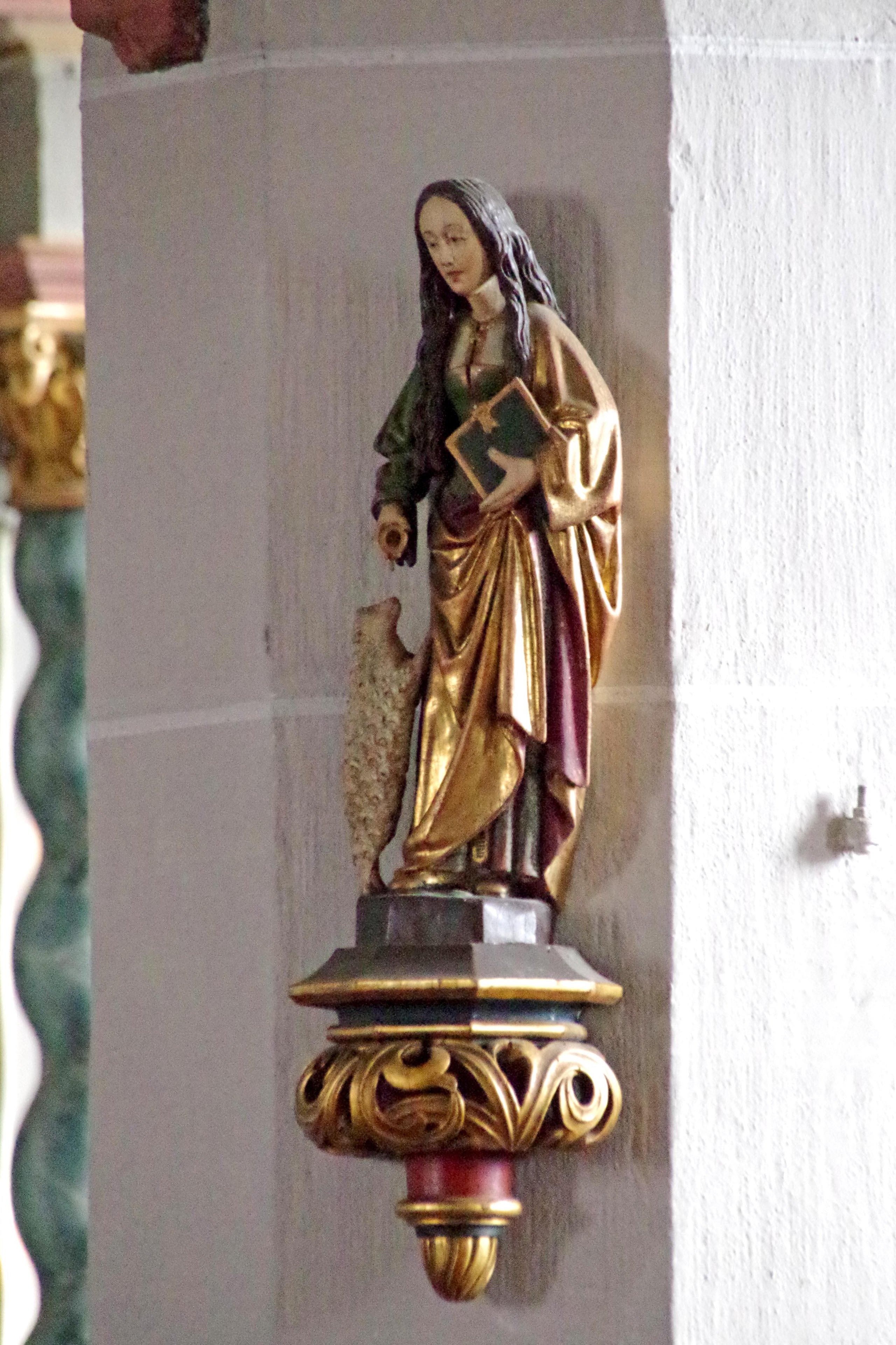 St. Kunibert (Sinzenich), Statue der hl. Agnes